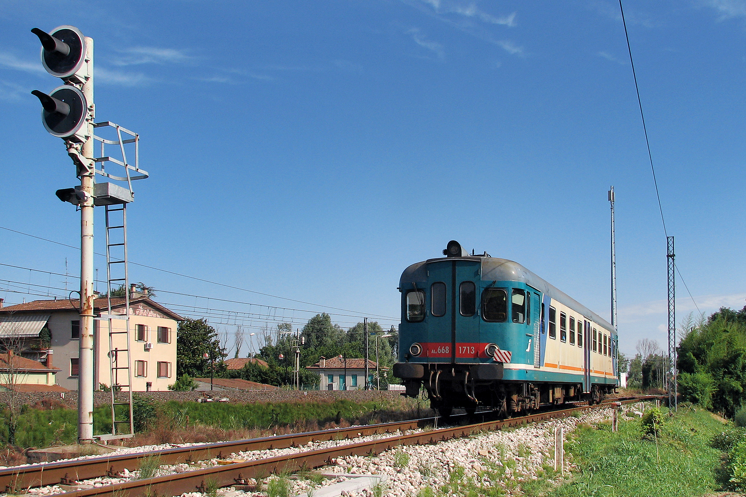 Automotrice ALn 668.1713 di Trenitalia a nolo a ST in arrivo a Rovigo con un treno da Chioggia.